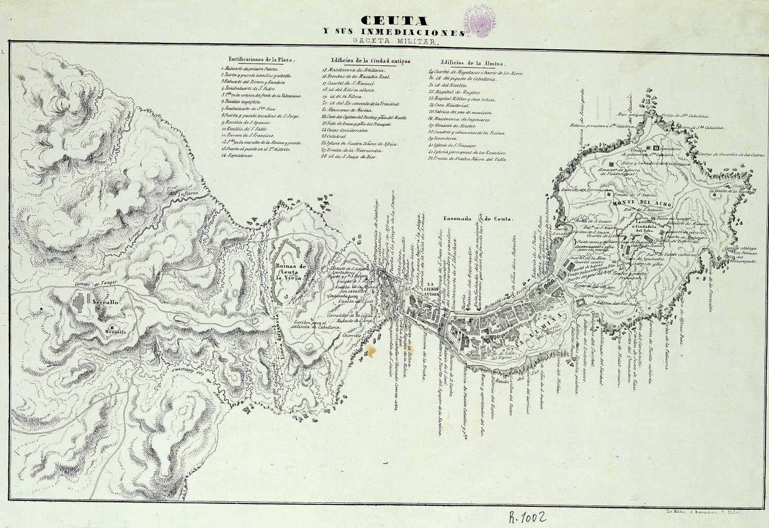 En la parte superior, bajo el título, relación de fortificaciones y edificios. Relieve por sombreado. - Hidrografía